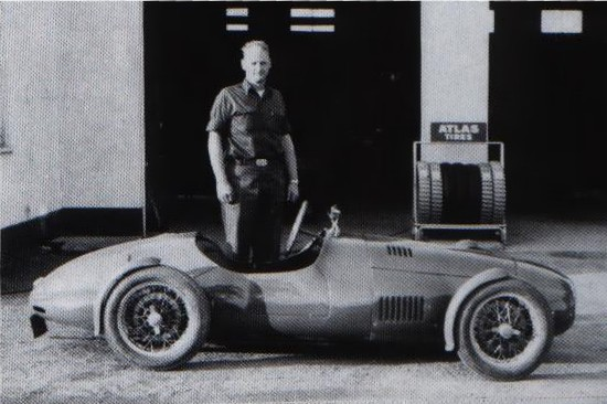 Bandini 750 sport siluro e C. Hassen tratta da Libro: Bandini (storia della vita e automobili di Ilario Bandini)